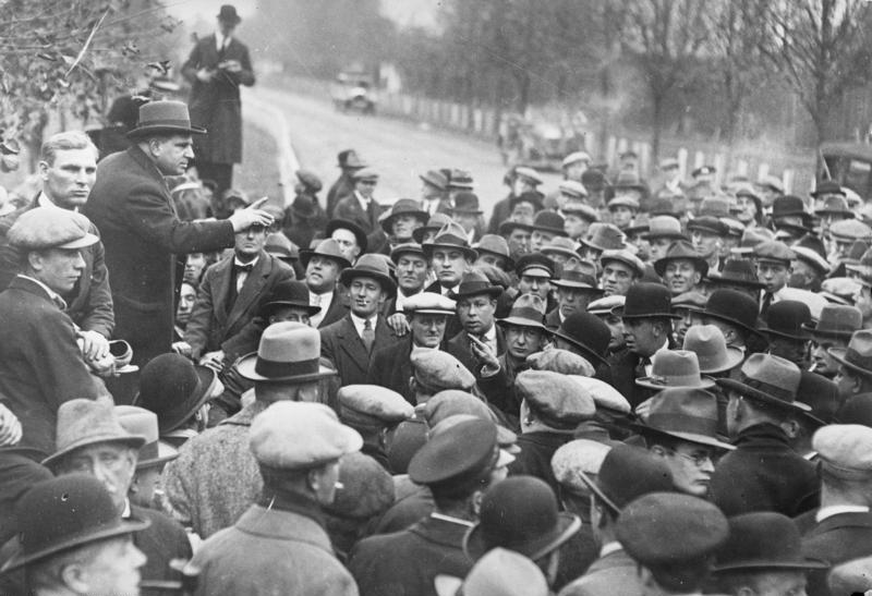 Zunehmende Arbeitslosigkeit in England! Englische Arbeitslose diskutieren auf der Strasse über die Folgen der zunehmenden Arbeitslosigkeit.